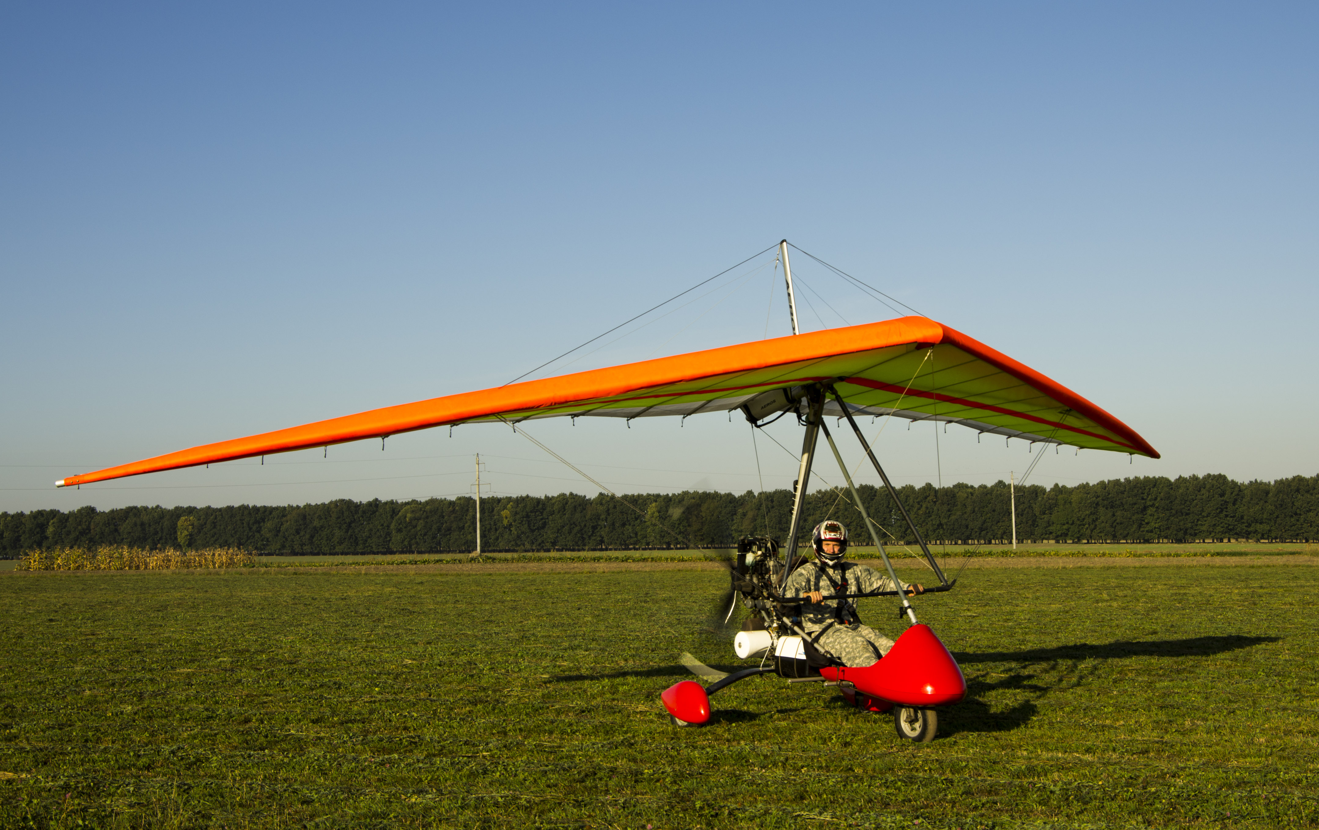 Украина г. Винница. Пилот - Александр Марчук Ukraine, Vinnitsa. Pilot - Oleksandr Marchuk